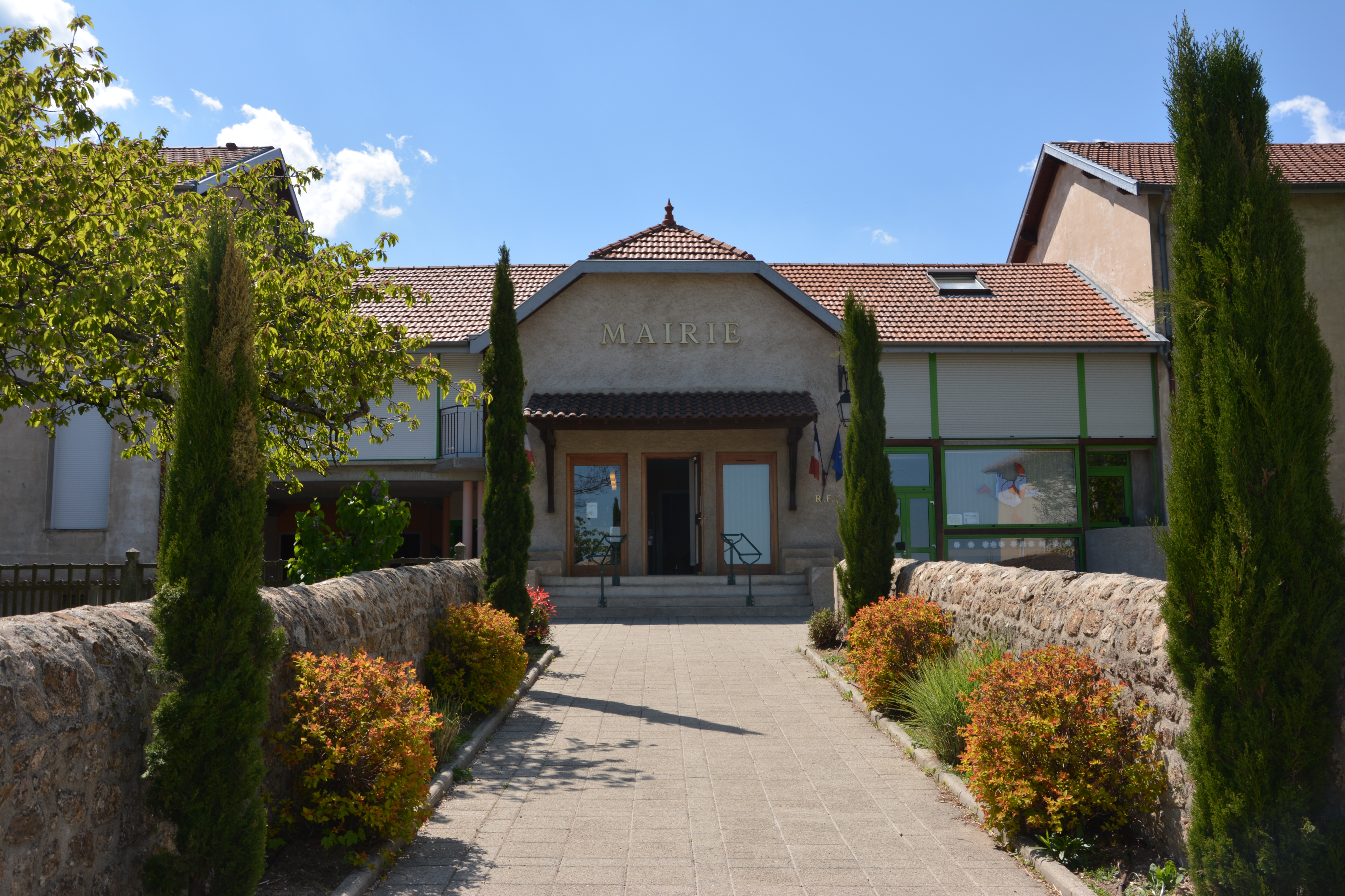 Mairie de Roisey, avril 2015.